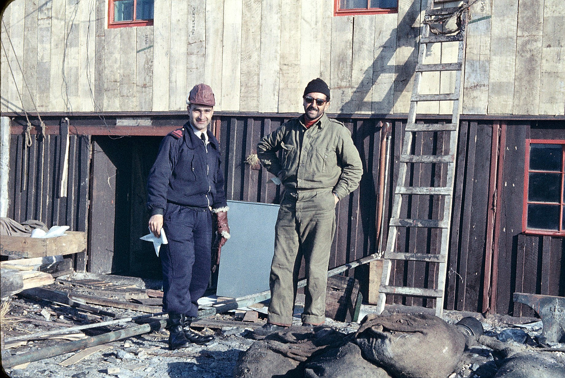 Se está terminando de construir la base Luis Risopatrón (incombustible)del Instituto Antártico de Chile. Tierra de O´Higgins, rada Covadonga. Tte. Di Martini de la Armada argentina en comisión en el Lientur.